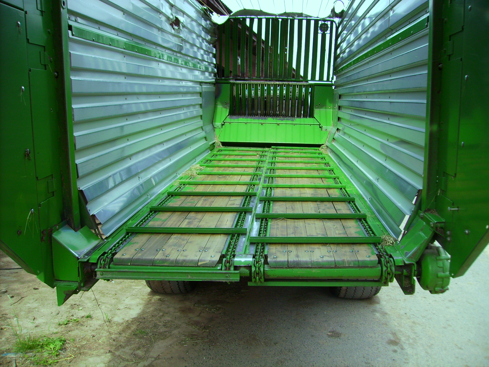 Bergmann-Ladewagen von hinten bei geöffneter Heckklappe, Kratzboden mit hydraulischem Antrieb